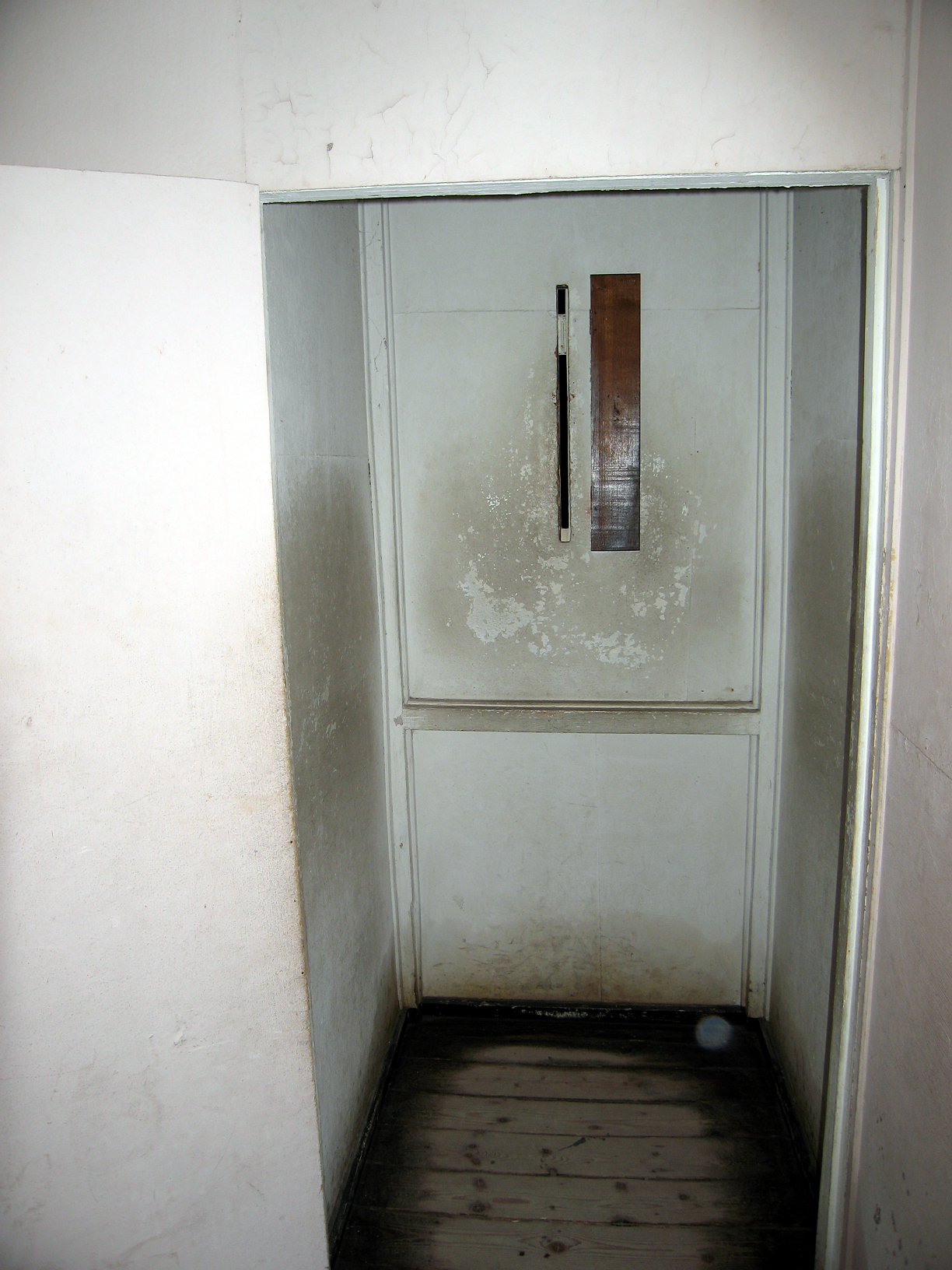 Rückseite der Genickschussanlage im KZ Buchenwald (Nachbau im Krematorium). Auf dieser Seite stand der Schütze.